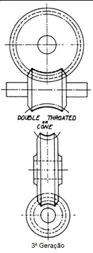 Terceira geração